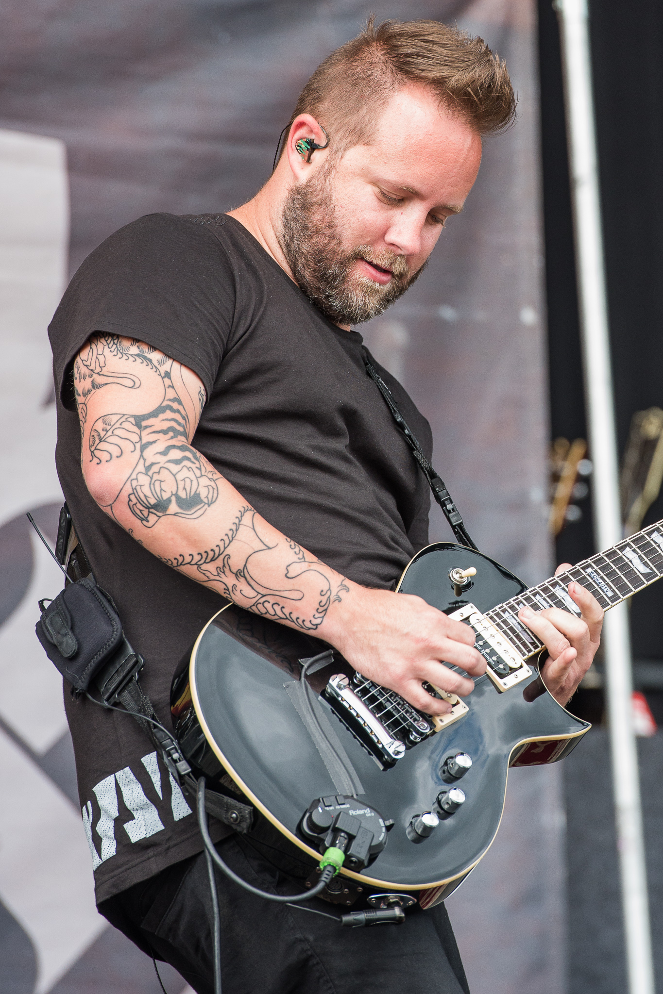 ARGO-Konzerte,Breaking Benjamin,Festival,Jasen Rauch,Konzert,Livekonzert,Livemusik,Musik,RiP,Rock im Park 2016,Seat Zeppelin Stage